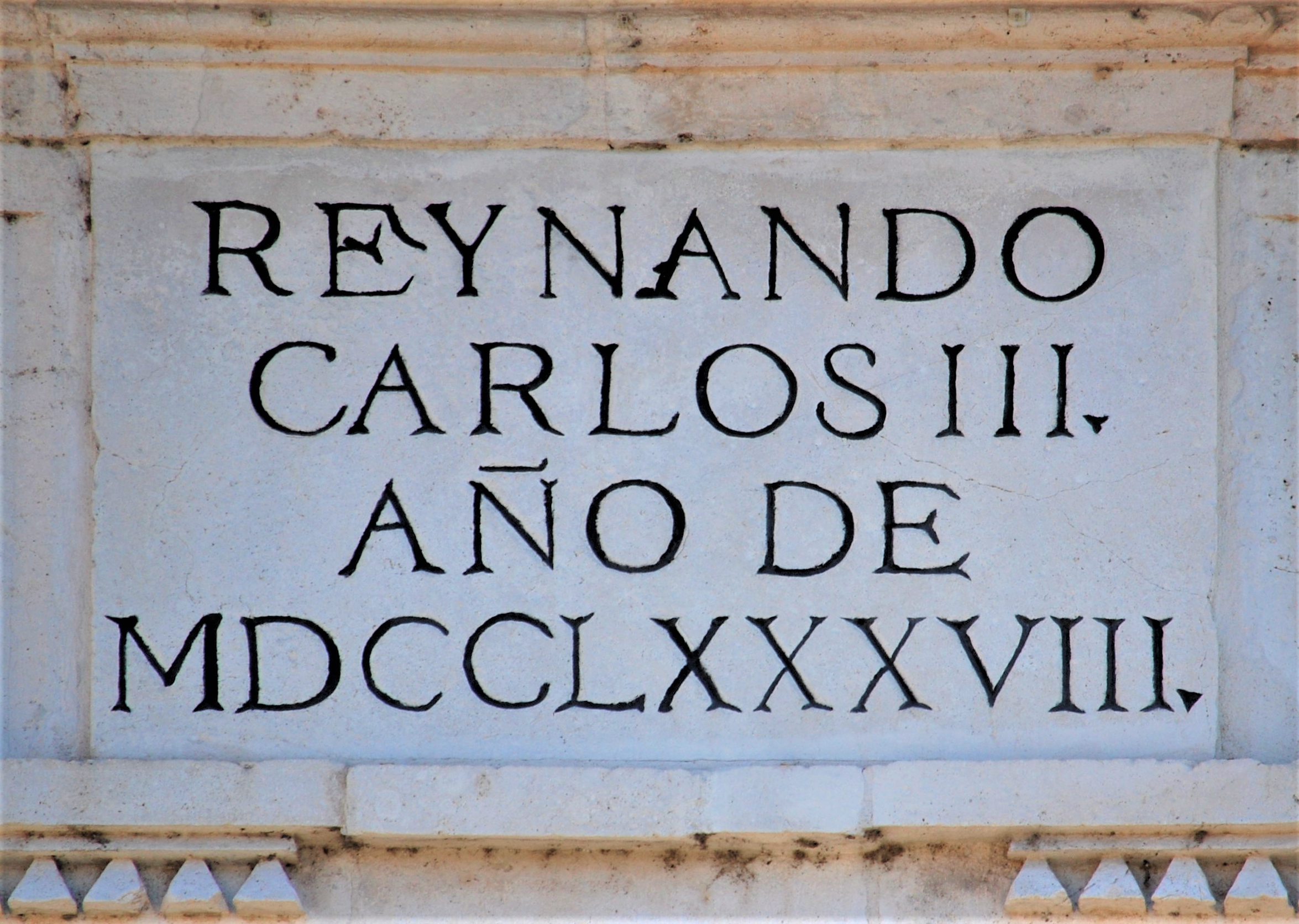 Lápida situada en el frontón de la fachada oeste de la Puerta de Madrid en Alcalá de Henares (Comunidad de Madrid - España). Presenta grabada la inscripción: «REYNANDO CARLOS III. AÑO DE MDCCLXXXVIII.»